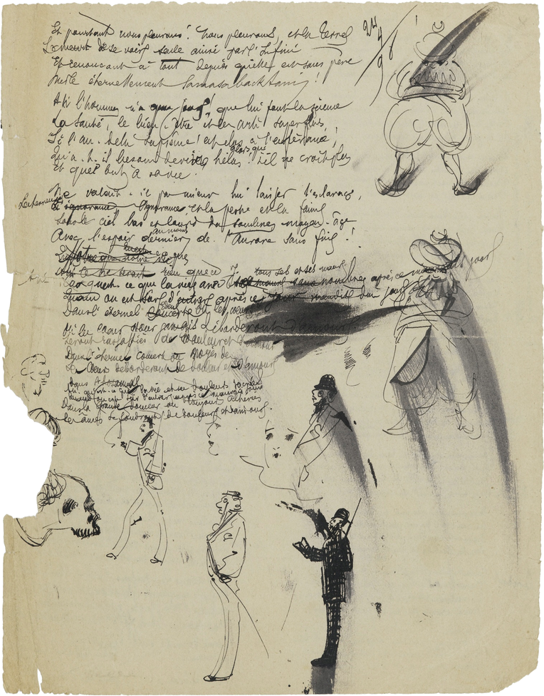 Poème autographe illustré provenant de l'ancienne collection de Stéphane Mallarmé.